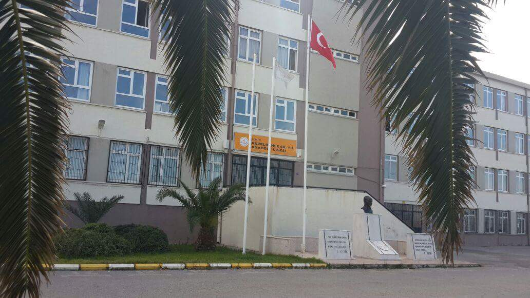 Okul bahçesinden görünüm